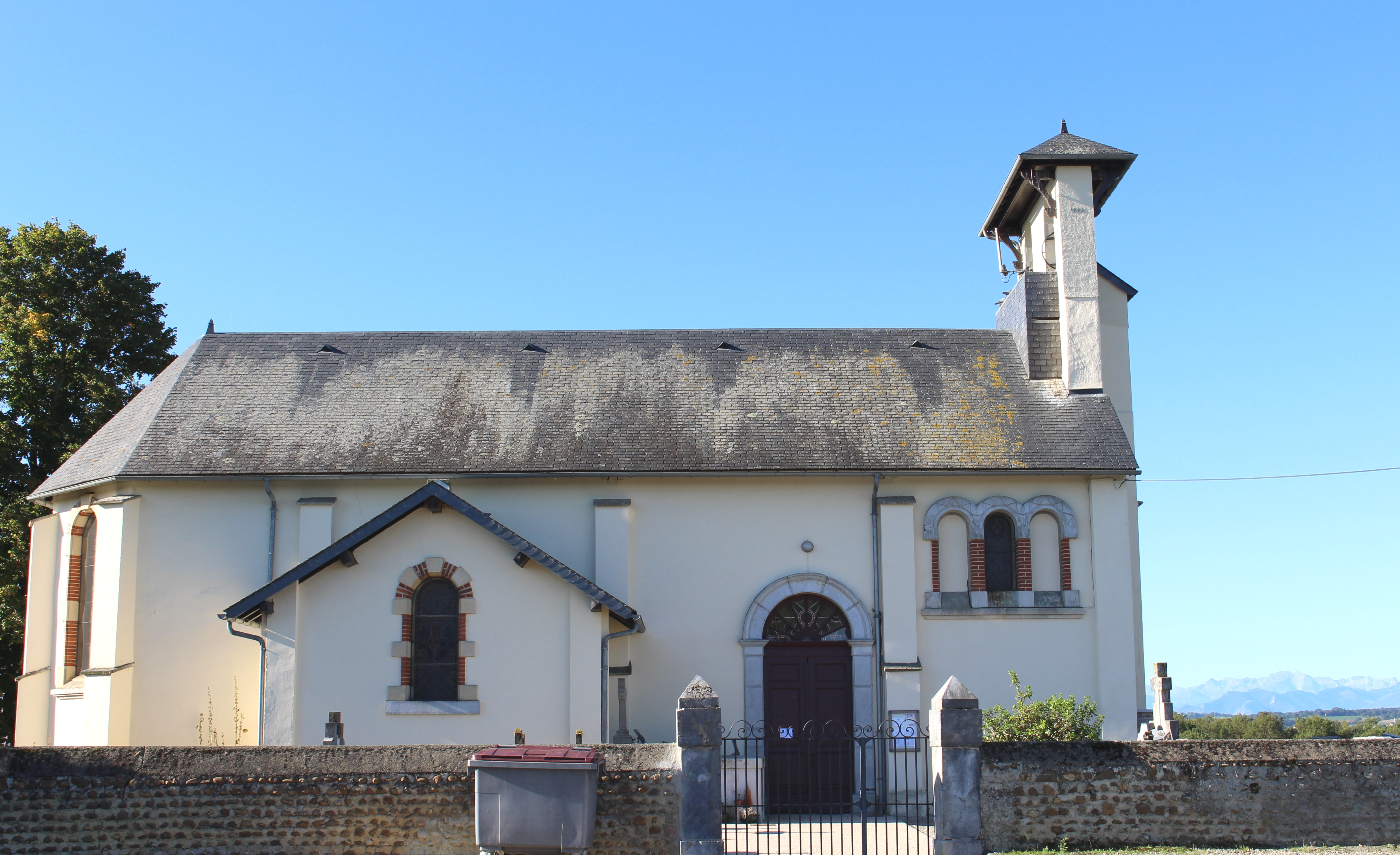 Église de l'Assomption de Coussan (Hautes-Pyrénées)